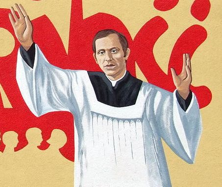 Jerzego Popiełuszki, znajdujący się na budynku lokalnej siedziby związku w Ostrowcu Świętokrzyskim